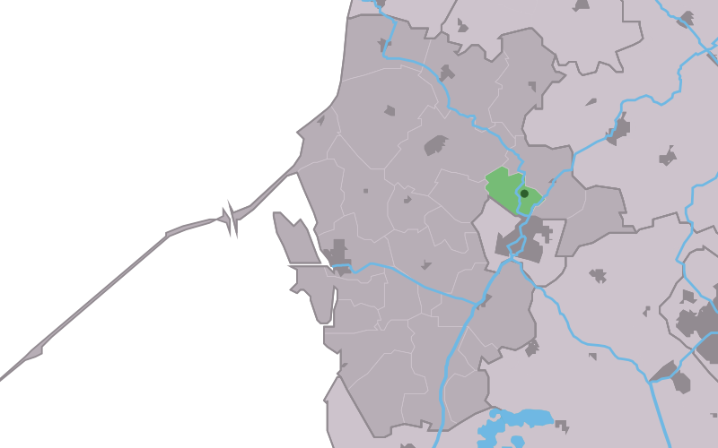 Kaartsje fan himrik fan Hichtum